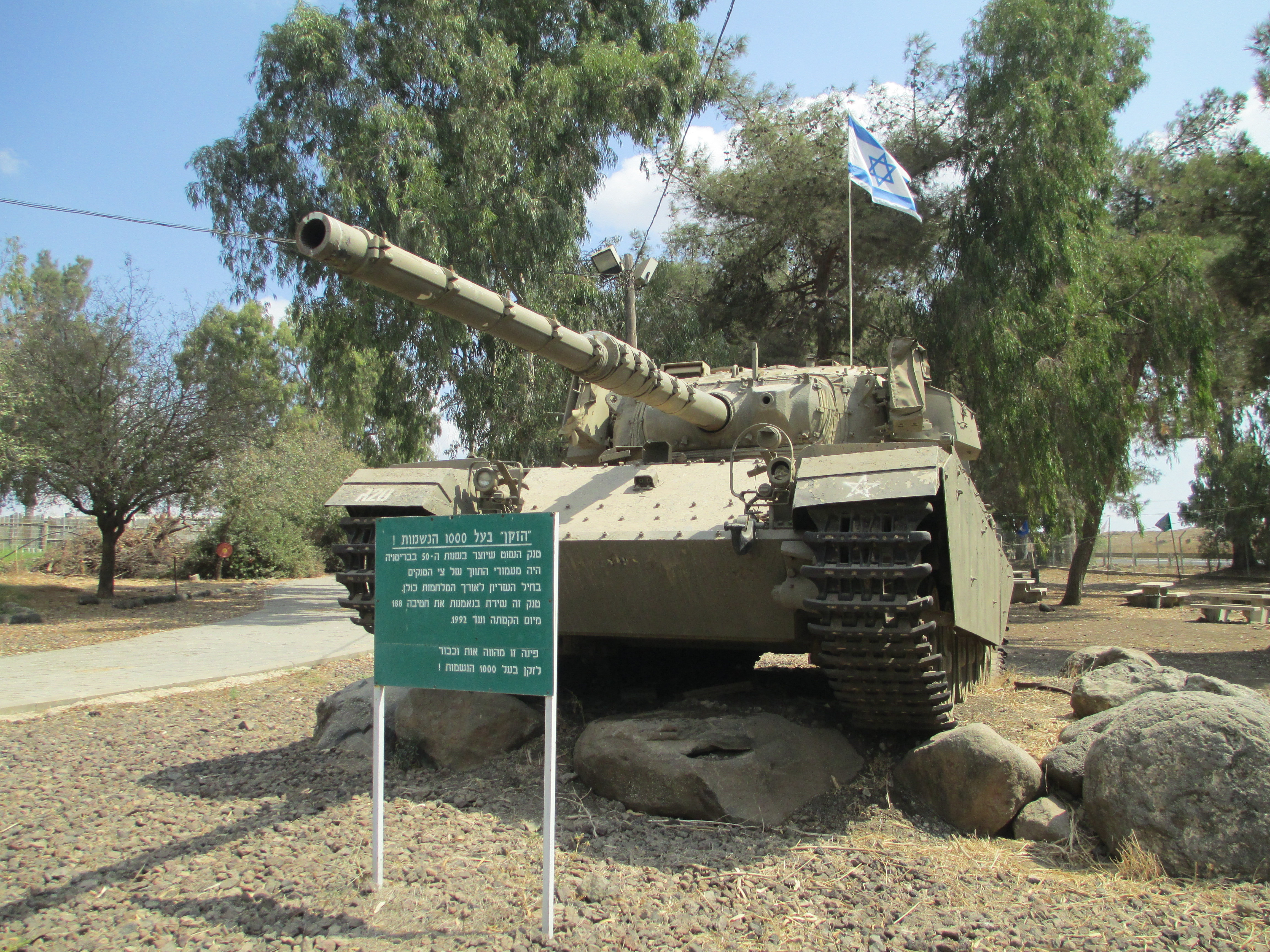 טנק "שוט" בעל "אלף הנשמות" באתר הזיכרון המרכזי של חטיבת ברק (188) במחנה עלייקה ברמת הגולן